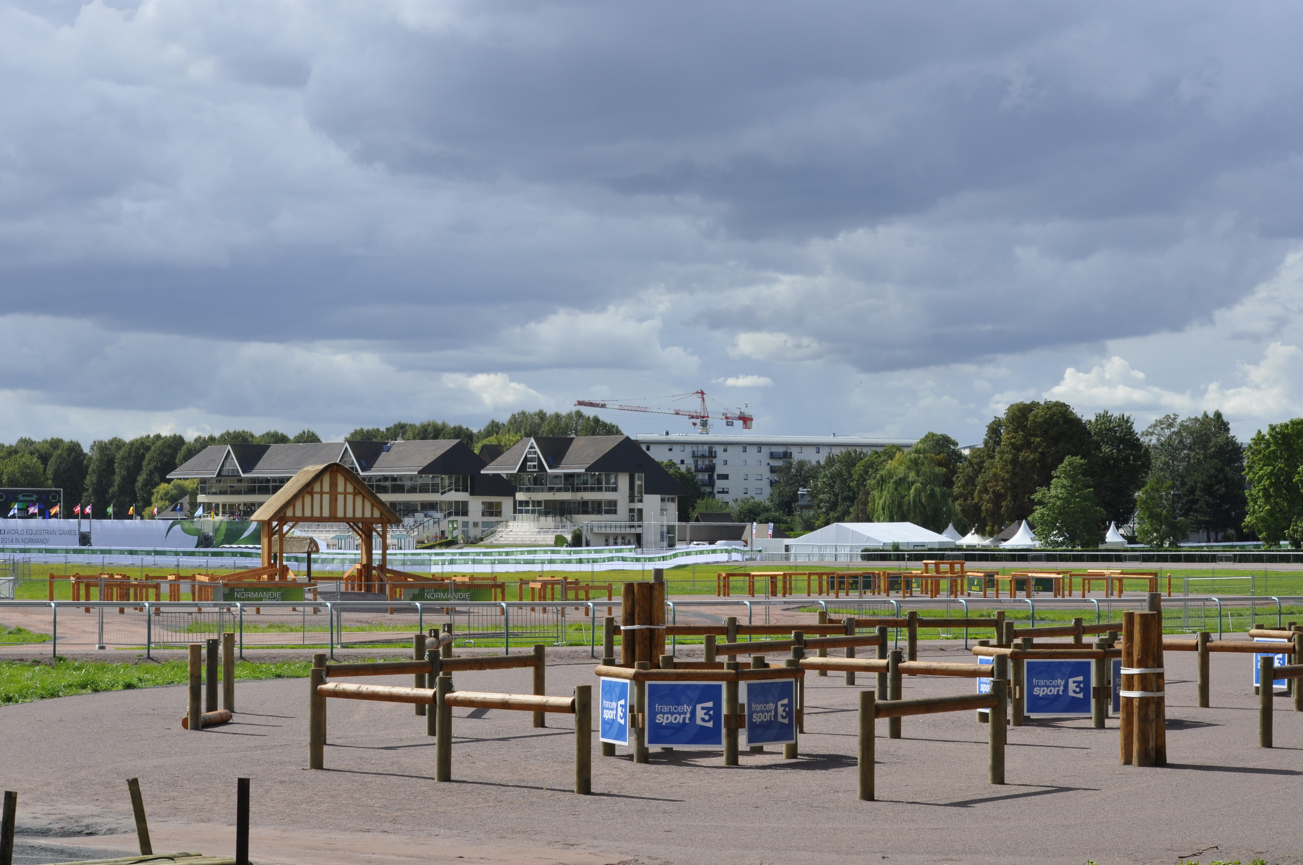 équipements pour le dressage sur la Prairie JEM 2014